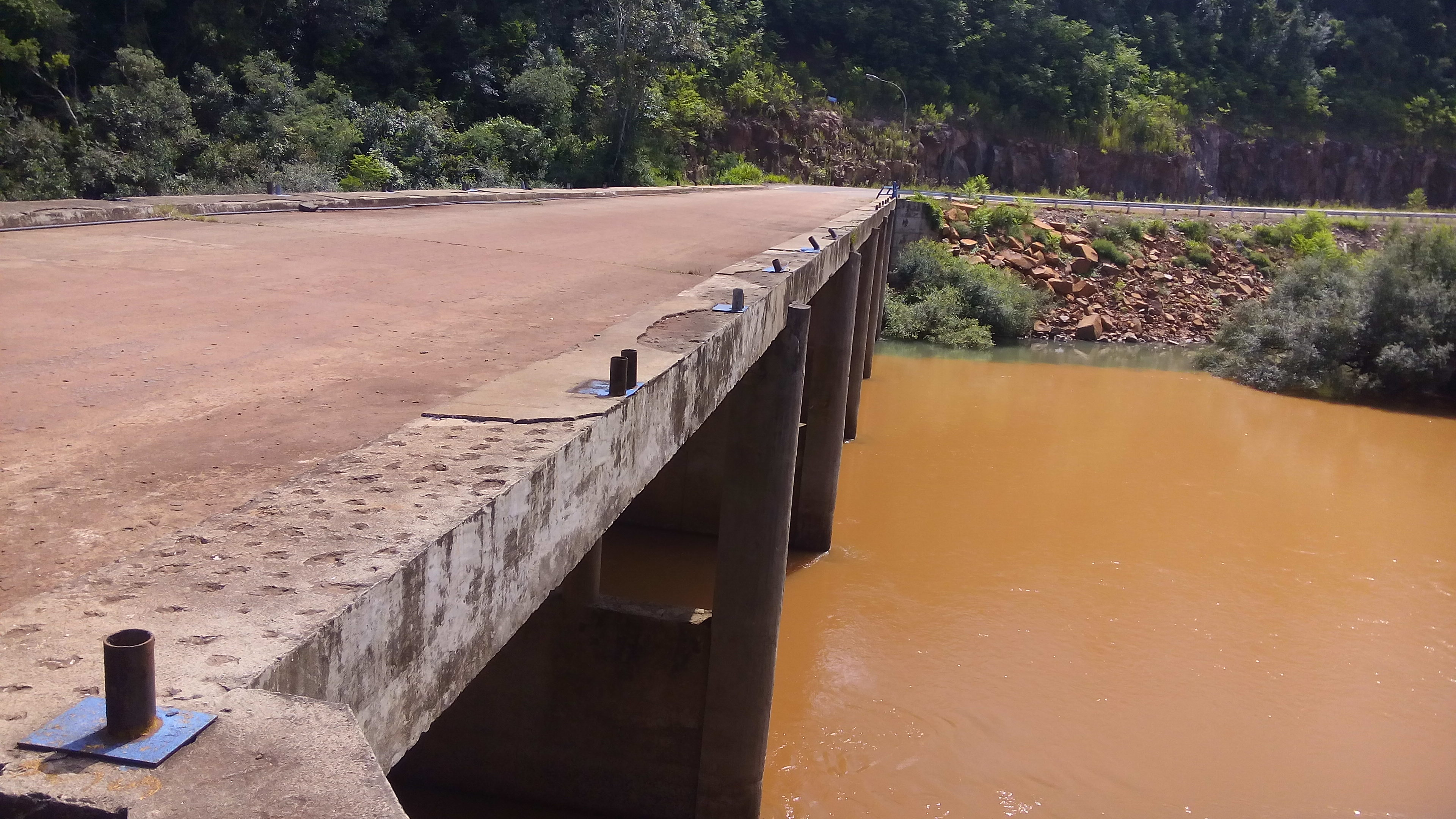 Puente sobre río Pepirí Guazú, frontera entre Brasil y Argentina. Comunica las localidades de Paraíso (Santa Cantarina) y Paraje Rosales (Misiones).